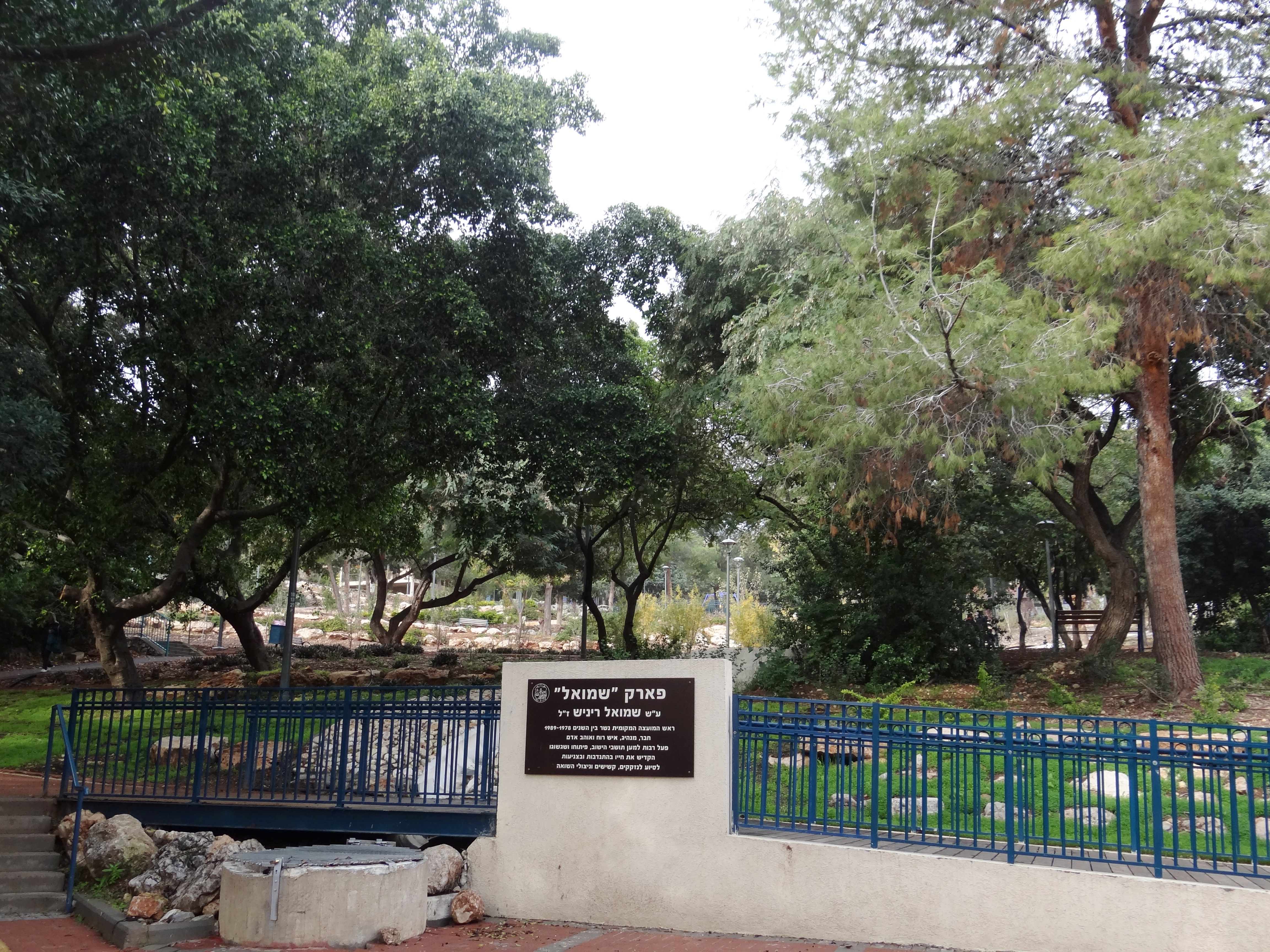 פארק שמואל על שם שמואל רייניש שהיה ראש המועצה של העיר נשר בין השנים 1989-1978 נמצא בואדי שמפריד בין שכונת בן-דור לבין שכונת גבעת עמוס בעיר נשר. שכונת גבעת עמוס הוקמה בסוף שנות ה-70 של המאה העשרים. הפארק שוקם בשנת 2013